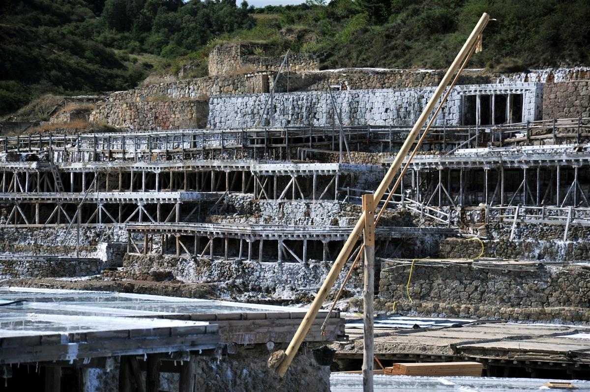 Terrazas de producción de sal del Valle Salado de Salinas de Añana (País Vasco, España)